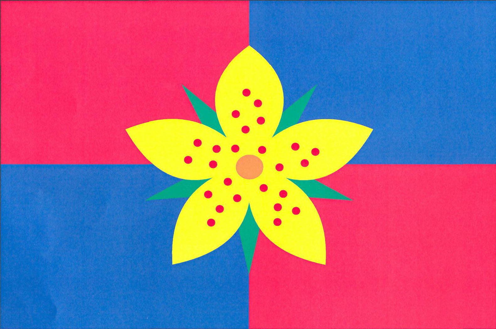 Vlajka obce Tlumačov(okres Domažlice)